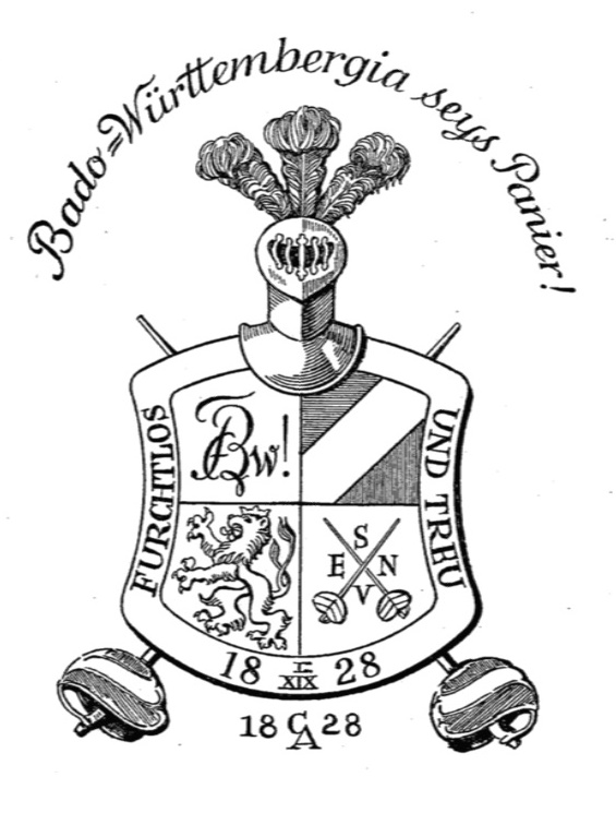 Studentenwappen des Corps Bado-Württembergia zu Göttingen (1825-1830)